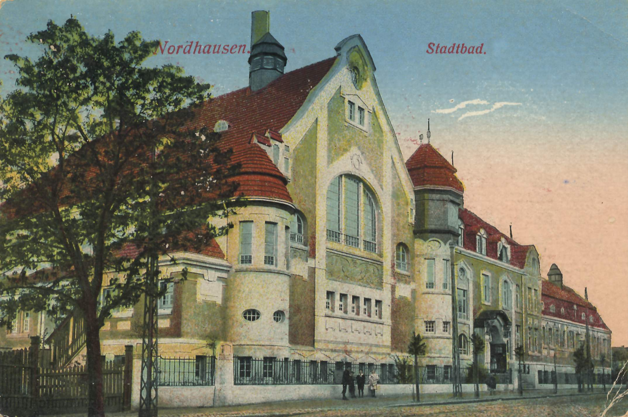 Das 1907 eröffnete Stadtbad ist ein Jugendstilgebäude und befindet sich in der Grimmel-Allee, am Ostufer der Zorge. Das Bad wurde 1906 und 1907 nach Plänen des Nordhäuser Architekten Gustav Ricken errichtet. Dem Besucher standen damals ein Schwimmbecken, ein Sonnenbad, 13 Wannenbäder und 27 Brausezellen zur Verfügung. Die Fassade des Gebäudes ist durch unterschiedliche Jugendstilelemente und Fensterformen stark gegliedert. In den späten 1920er Jahren wurde im rückwärtigen Teil des Gebäudes eine Dampfwaschanstalt angebaut, um die Wirtschaftlichkeit des Bades zu gewährleisten. Das Gebäude wurde nach umfassender Sanierung in den Jahren 2000-01 als Erlebnisbad wiedereröffnet.